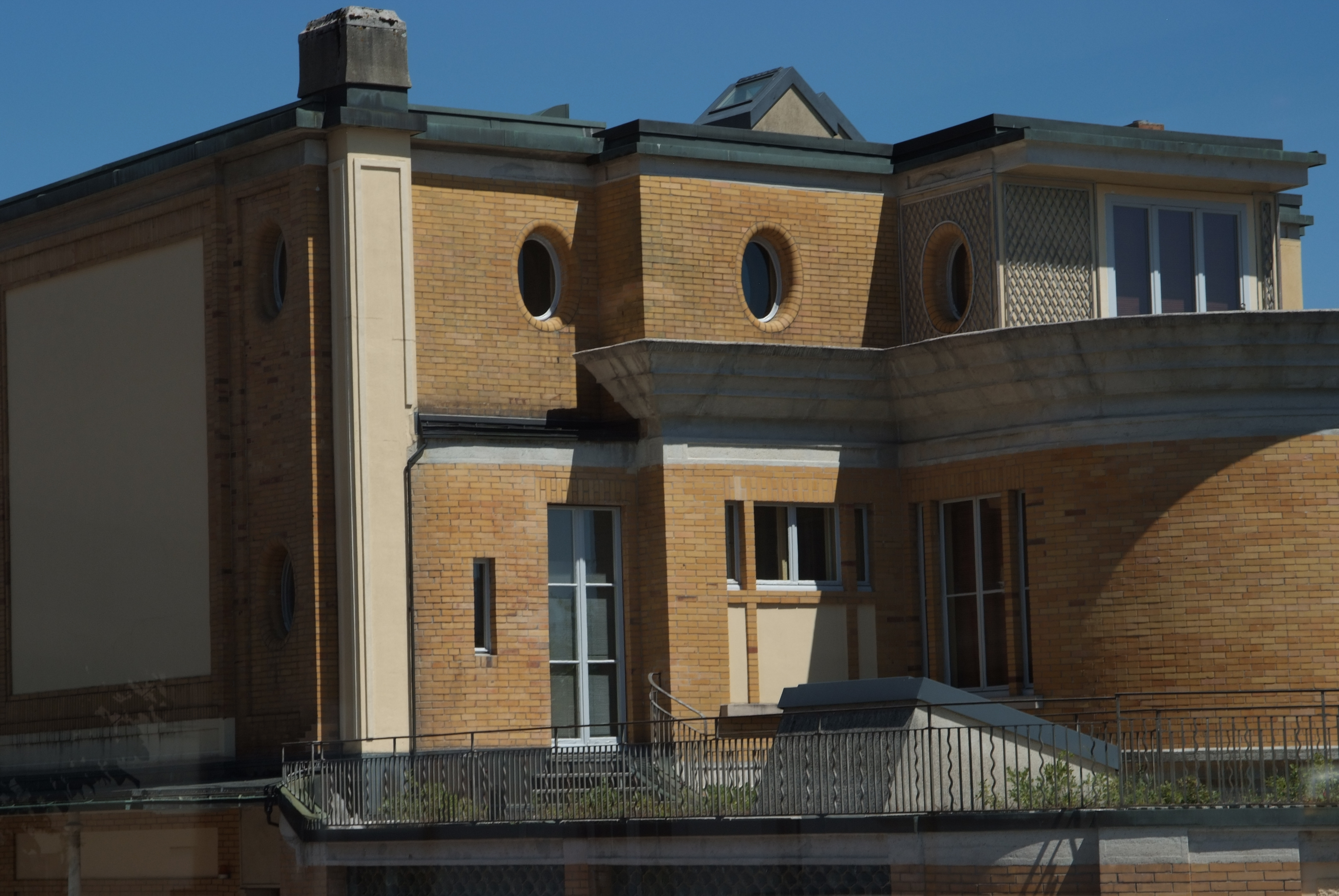 villa turque à La Chaux-de-Fonds architecte Le Corbusier